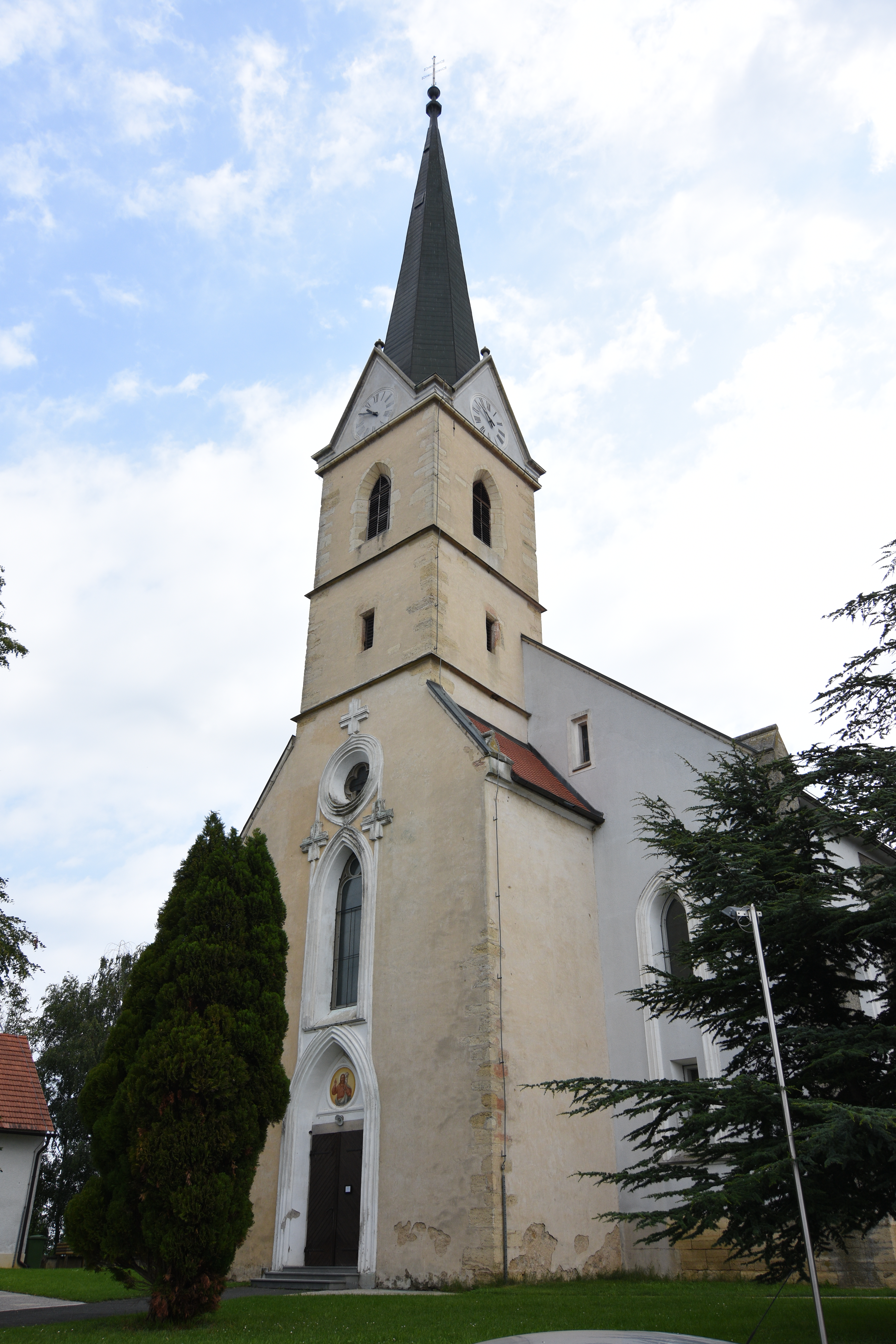 Holy Cross Church, Križevci pri Ljutomeru